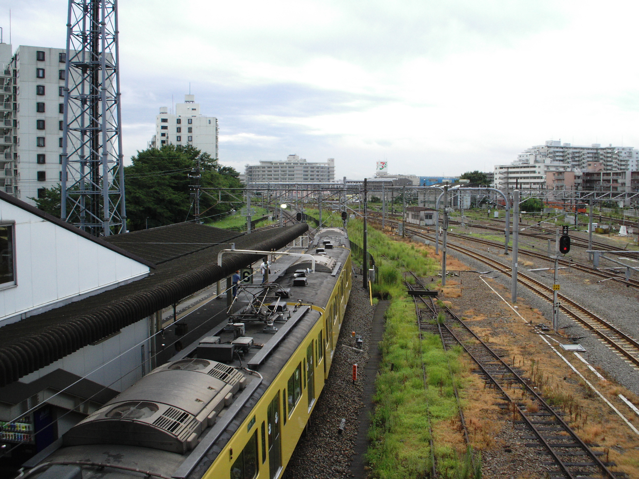 拝島駅跨線橋から立川方面を撮る